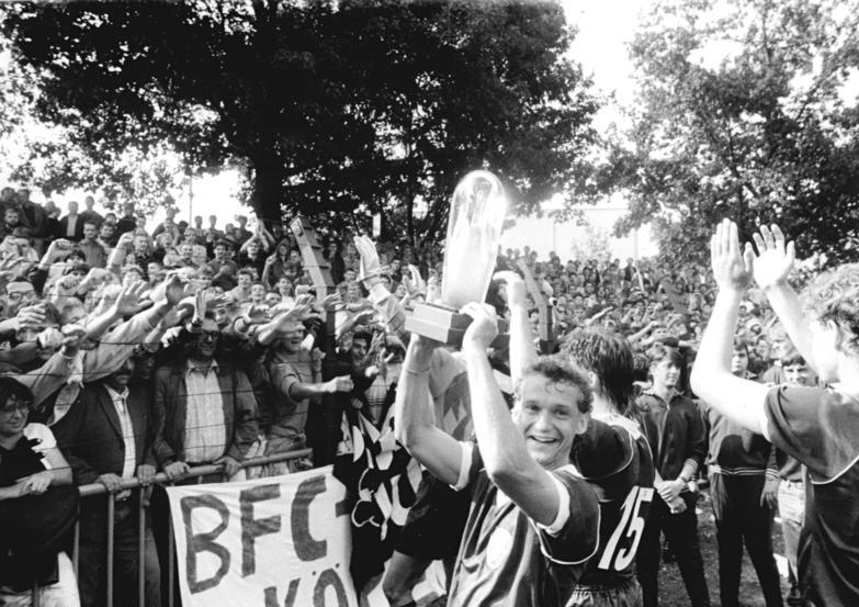 ADN-ZB-Oberst-5.8.89-sche- Cottbus: Fußball-Supercup SG Dynamo Dresden (Meister) - BFC Dynamo (Pokalsieger) 1:4- Vor der Rekordkulisse von 22 300 Zuschauern kam der BFC im erstmals ausgetragenen Supercup-Duell des DDR-Fußballs zu einem überzeugenden Erfolg. Der ehemalige Magdeburger Heiko Bonan zeigt glücklich den eben errungenen Pokal den vielen begeisterten Fans.